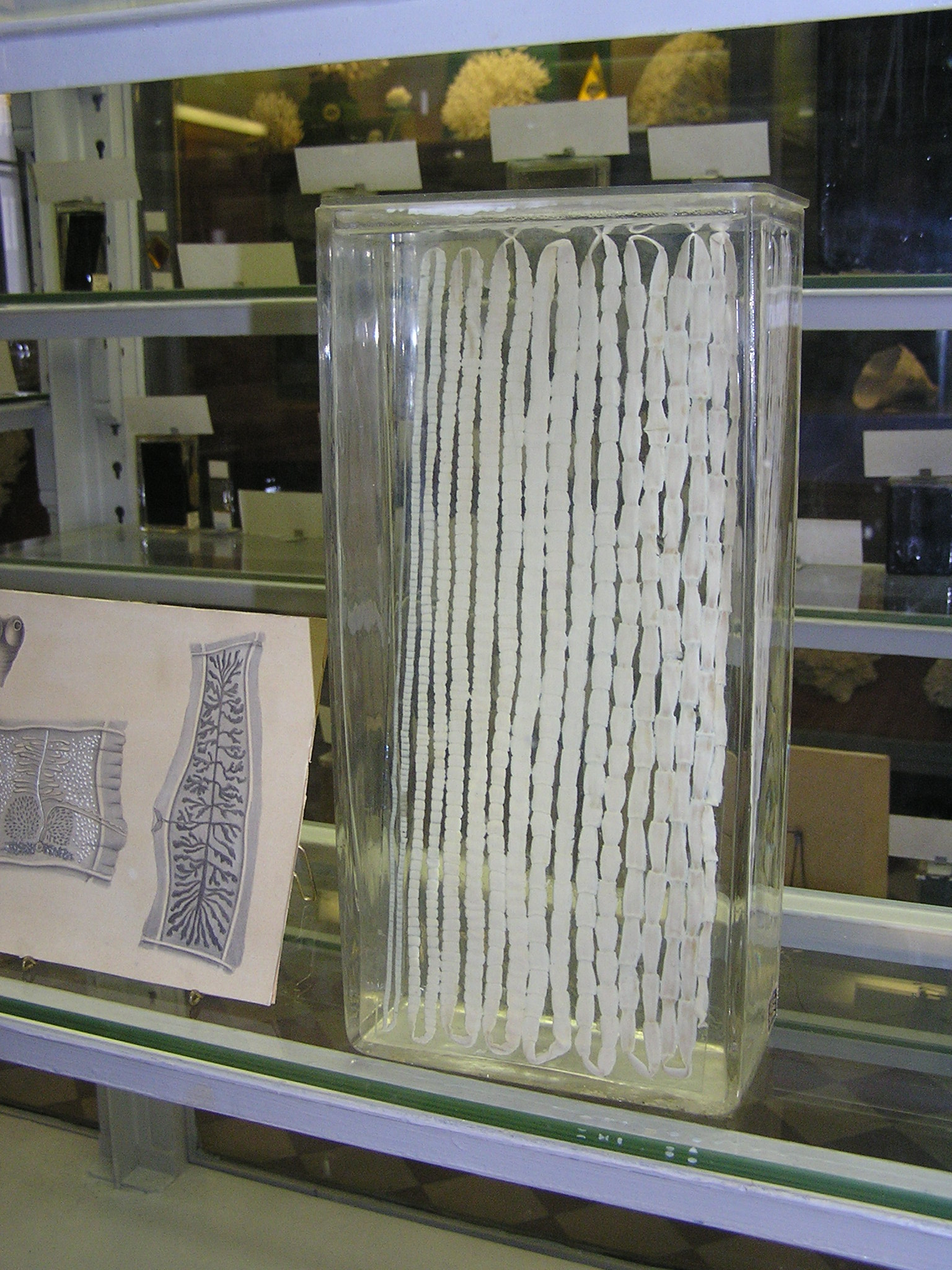 Зоологический музей в Санкт-Петербурге. Солитер